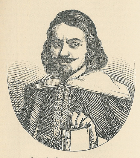 Formodet portræt af Peder Syv efter det i Hellested Kirke ophængte maleri